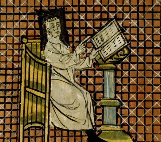 Miniatur, die einen Priester des Klosters von La-Croix-en-Brie darstellt, der eine neue branche des Roman de Renart (zw. 1170 und 1250) verfasst. Bibliothèque nationale de France, Paris; Manuscrits, français 1580 f. 34v.